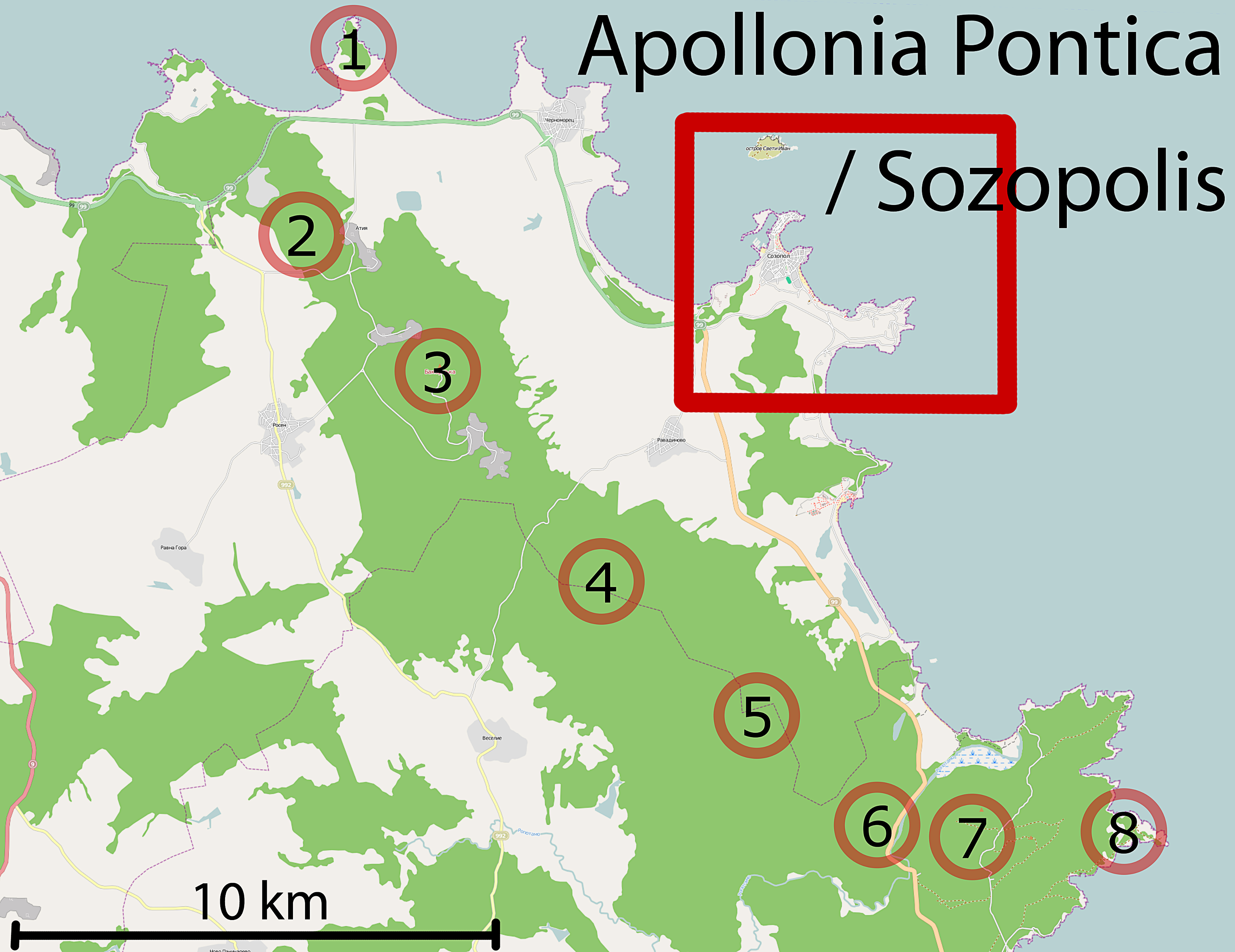 Karte von Sozopol und Umgebung; Bulgarien; von: antiker und spätantiker Festungsring um Sosopol; 1.)Akin, 2.)Gipfel Großer Rossen, 3.)Krimna, 4.)Lobodowo kale, 5.)Malkoto kale, 6.)Burchama, 7.)Ranuli, 8.)Maslen nos